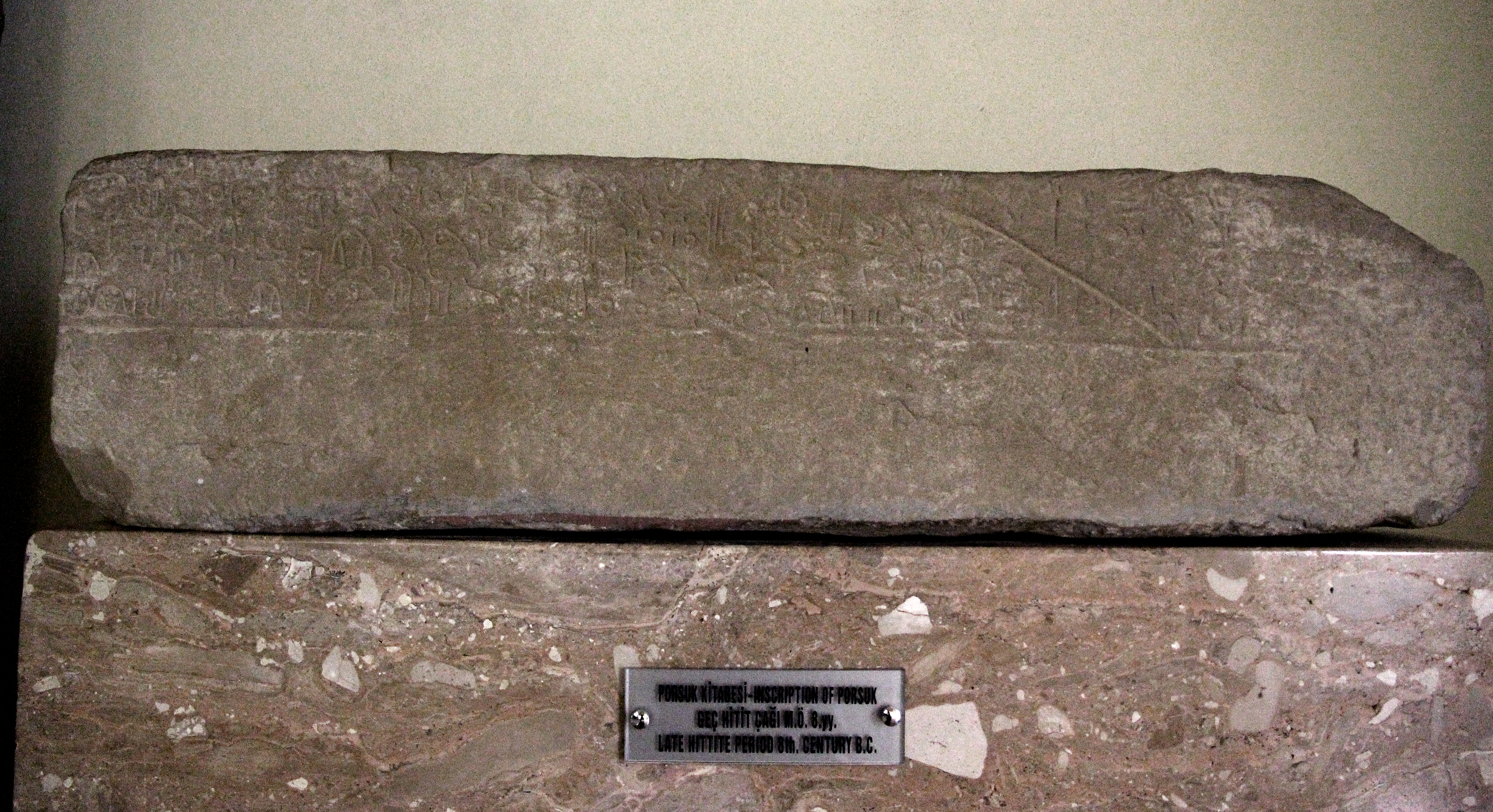 Archäologisches Museum Niğde, Türkei, Hieroglyphen-luwische Inschrift von Porsuk